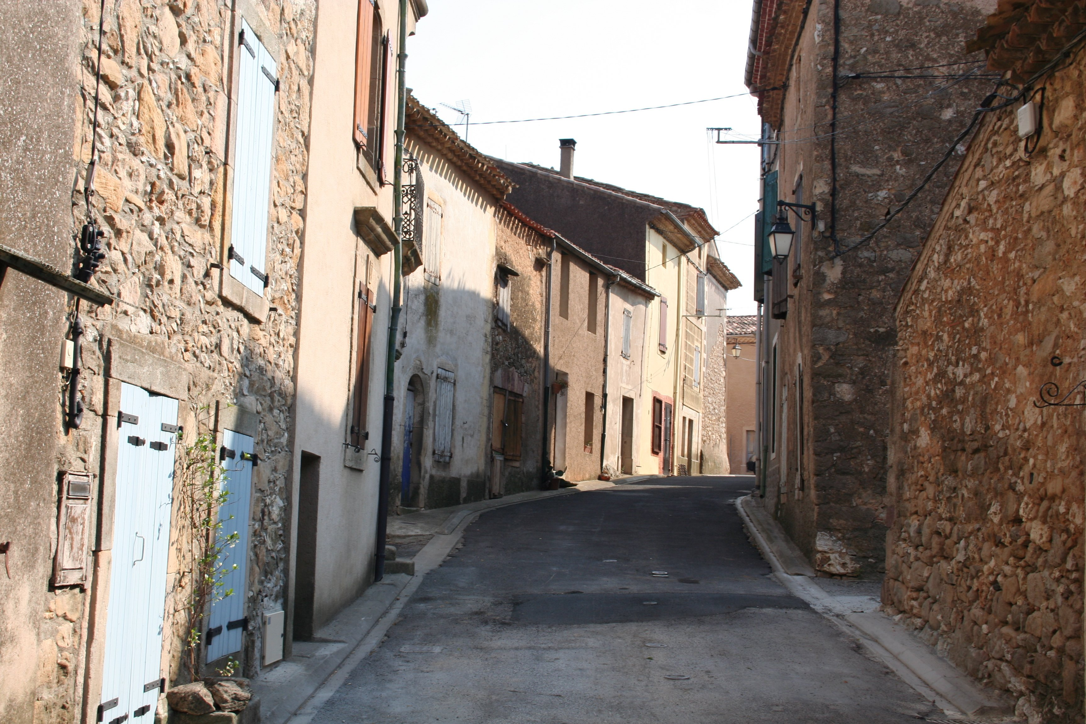 Ruelle d'Assignan, Hérault, France.